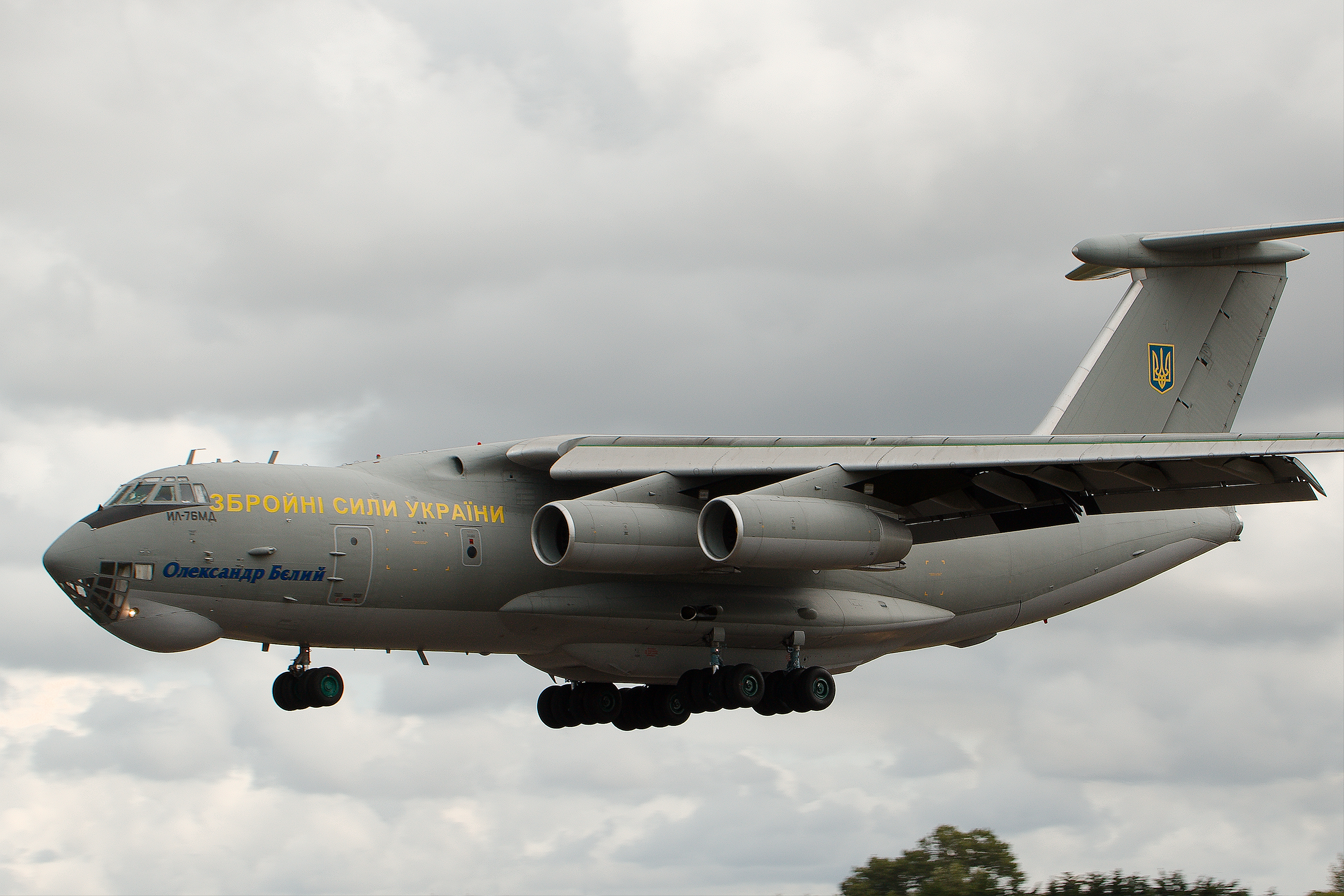 Il76 - RIAT 2019